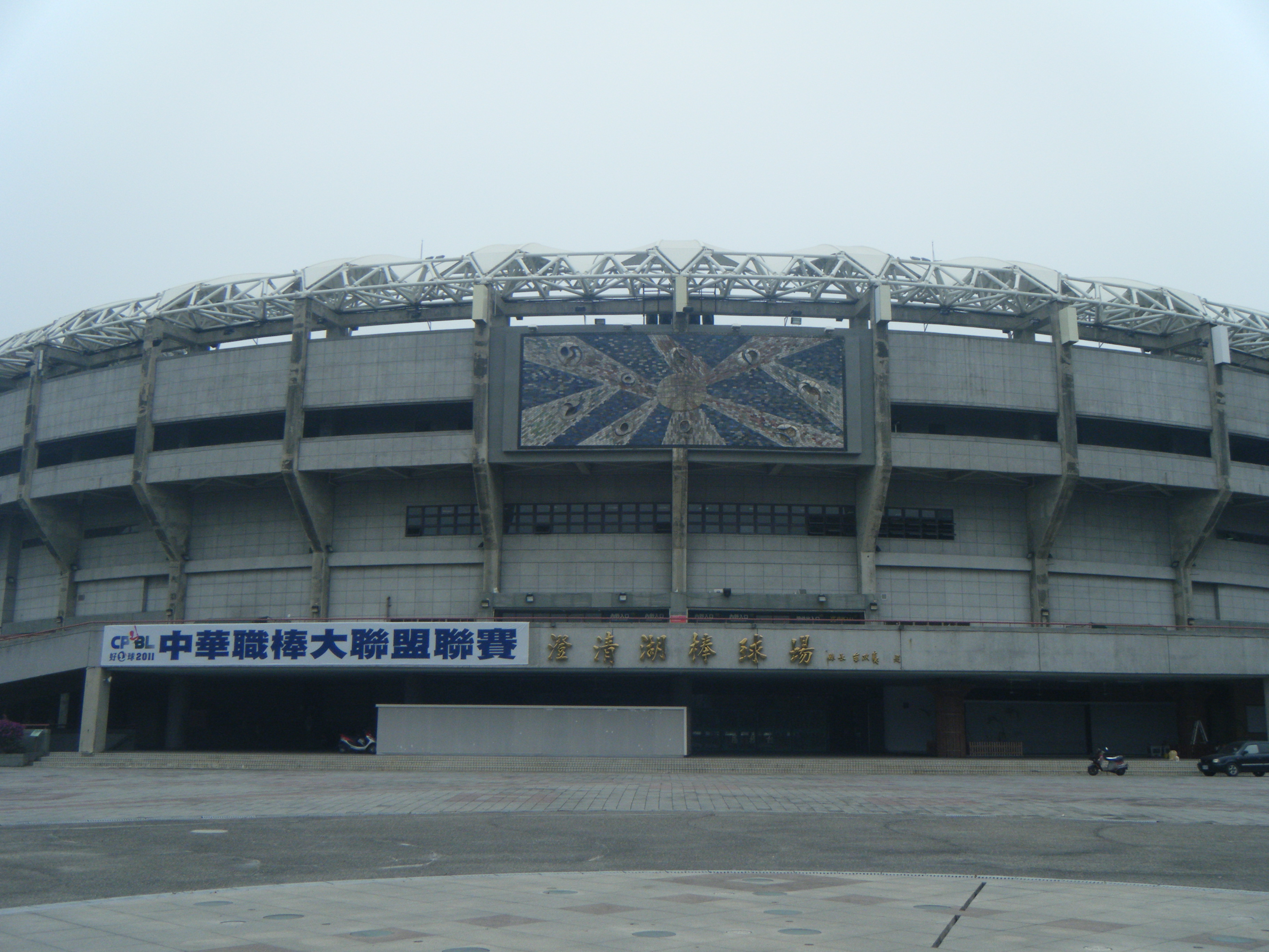 中文（台灣）: 澄清湖棒球場內野入口側，懸掛2011中華職棒大聯盟聯賽宣傳布條。